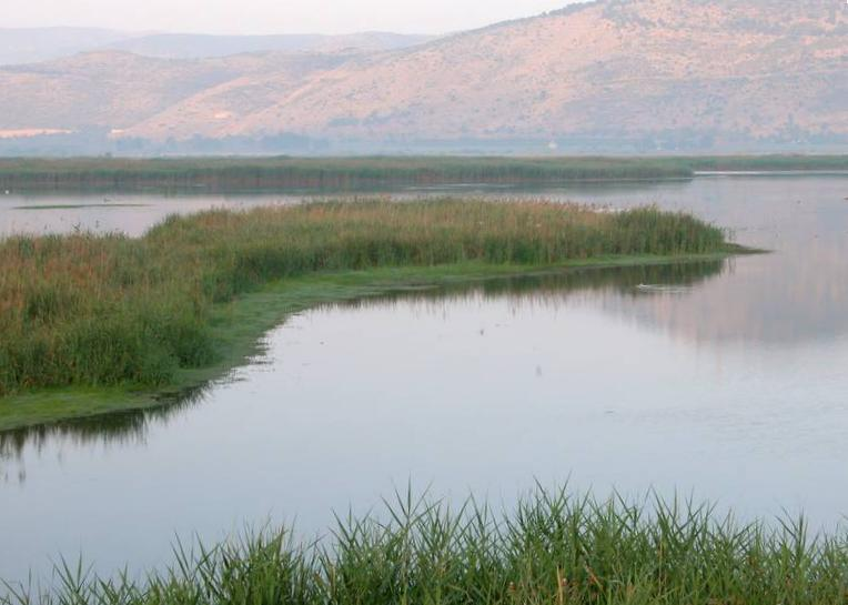 אגמון החולה על רקע הרי נפתלי --- Agmon HaHula (artificial lake in the Hula valley, Israel)